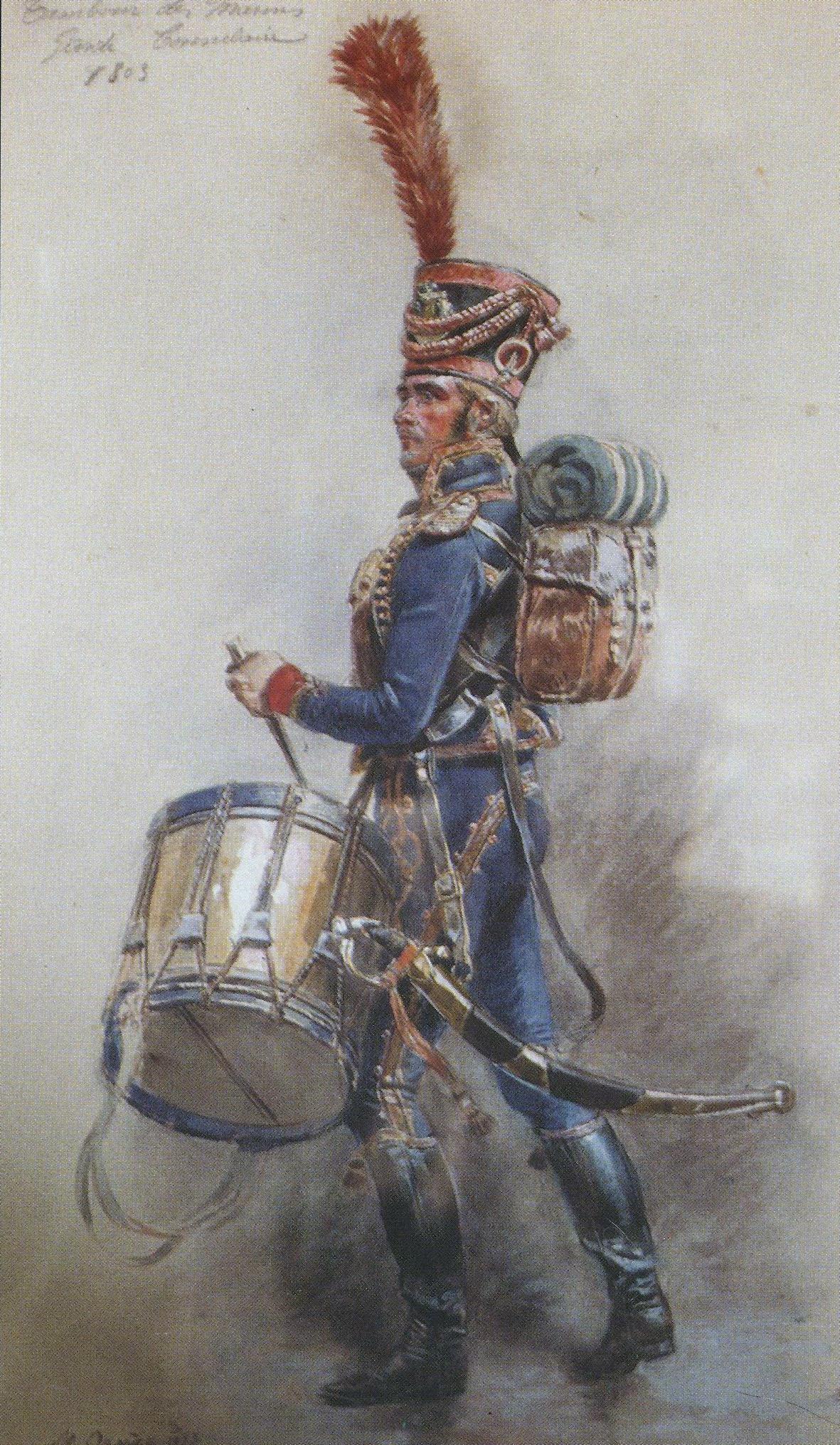 Légende inscrite à la main, en haut à gauche: Tambour des Marins - Garde Consulaire - 1803